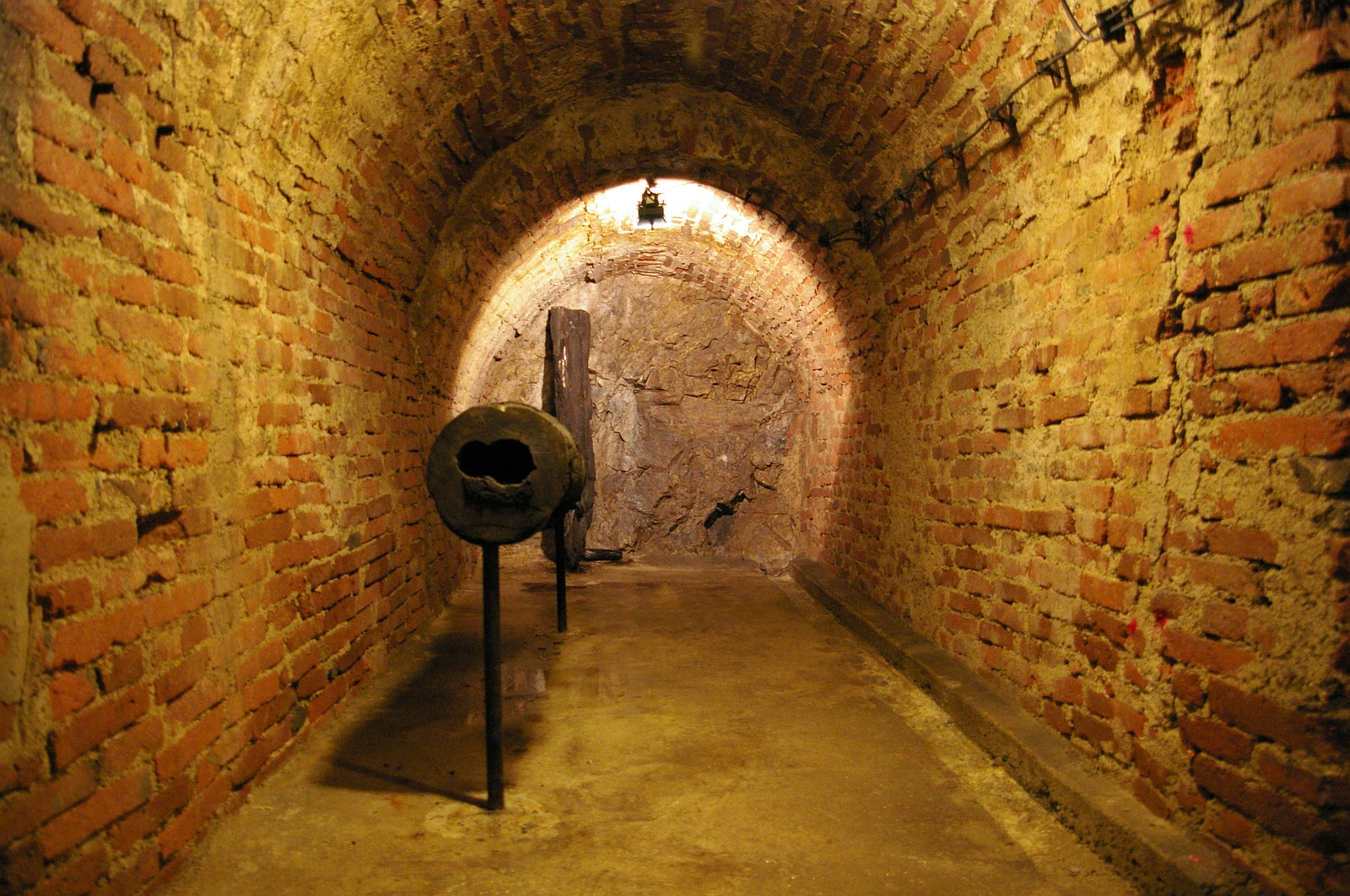 Jihlava katakomby 3